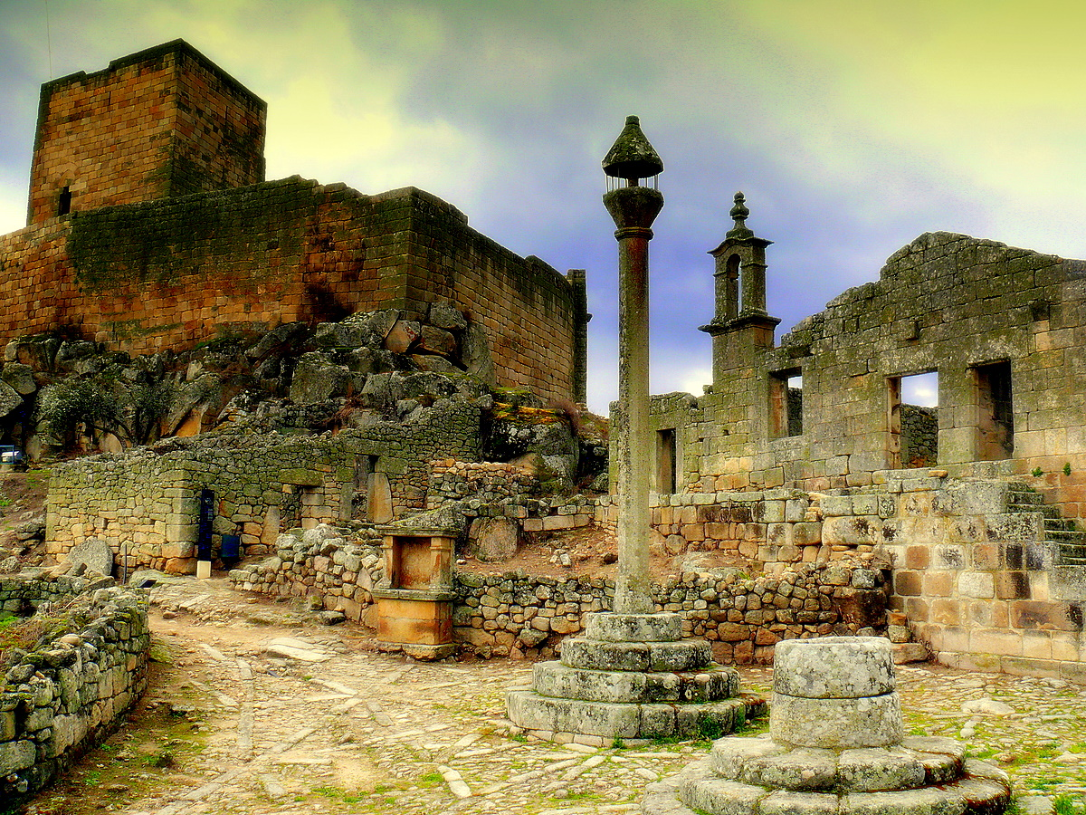 pelourinho e recinto do castelo na aldeia histórica de Marialva